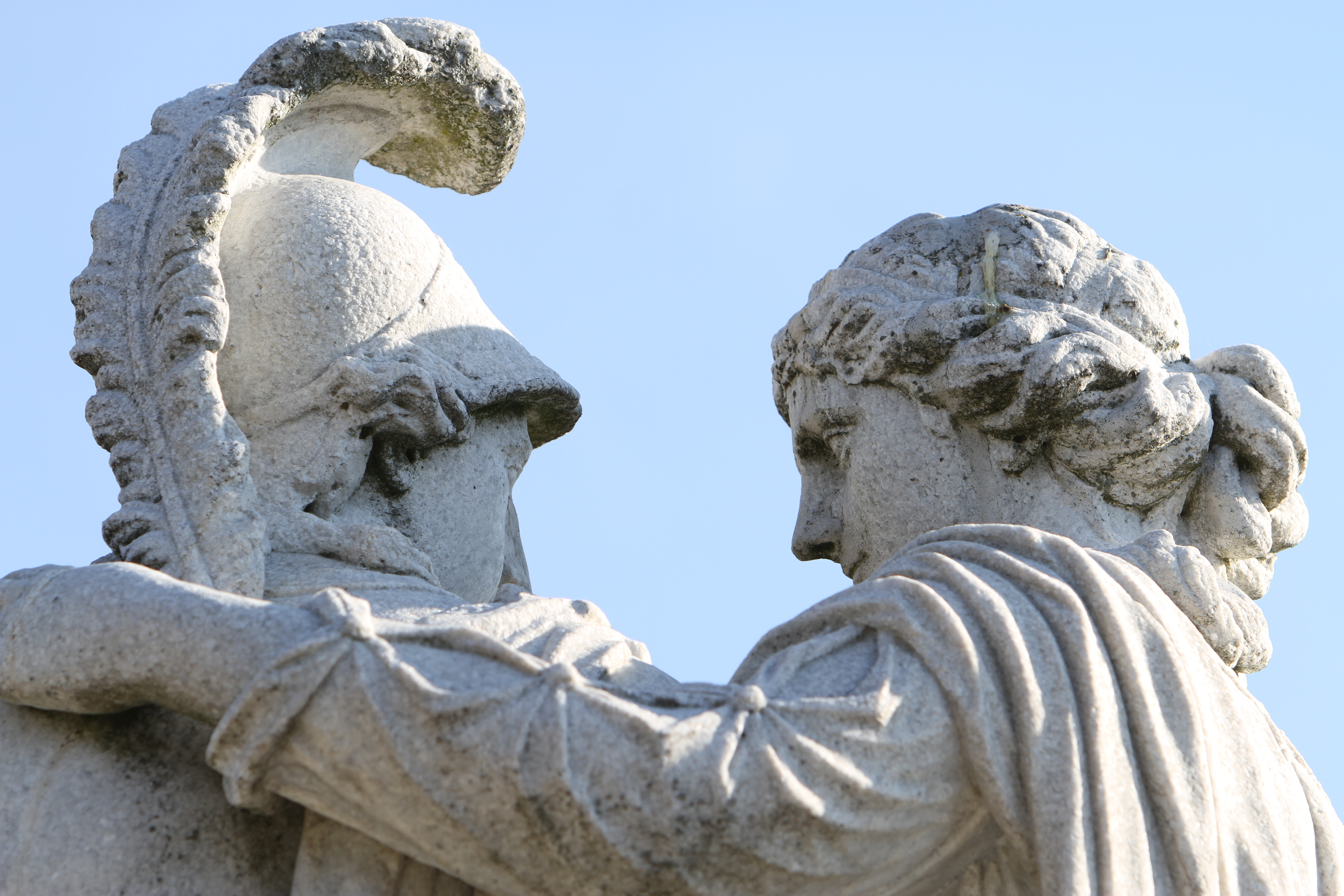 Alexander und Olympias